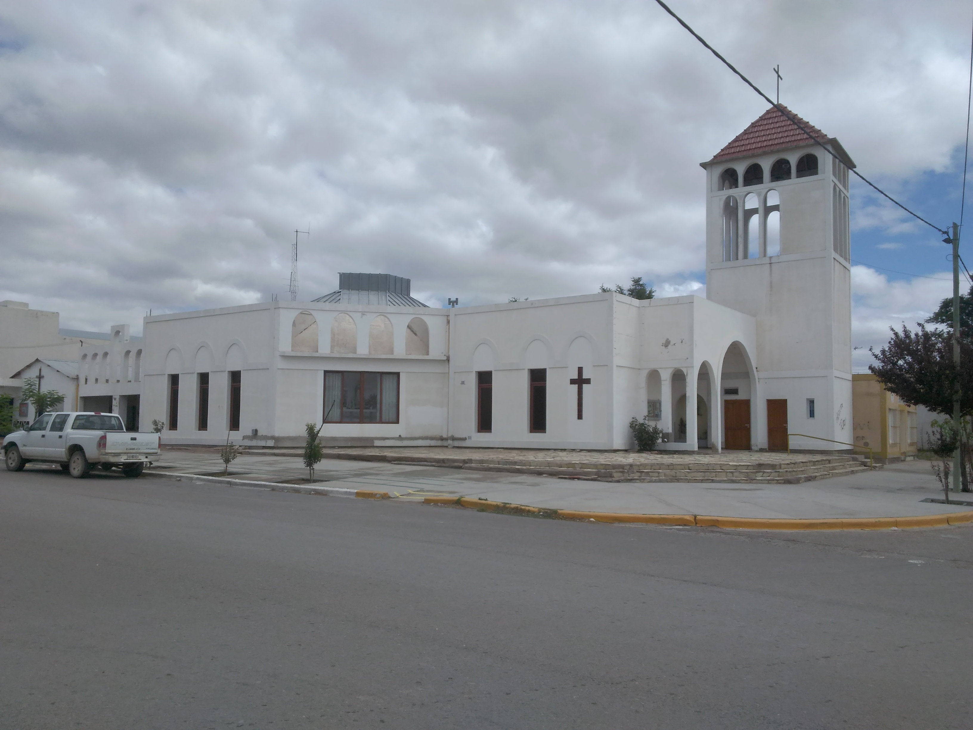 Nuestra Señora de Lourdes iglesia catòlica de Sierra Grande en su centro